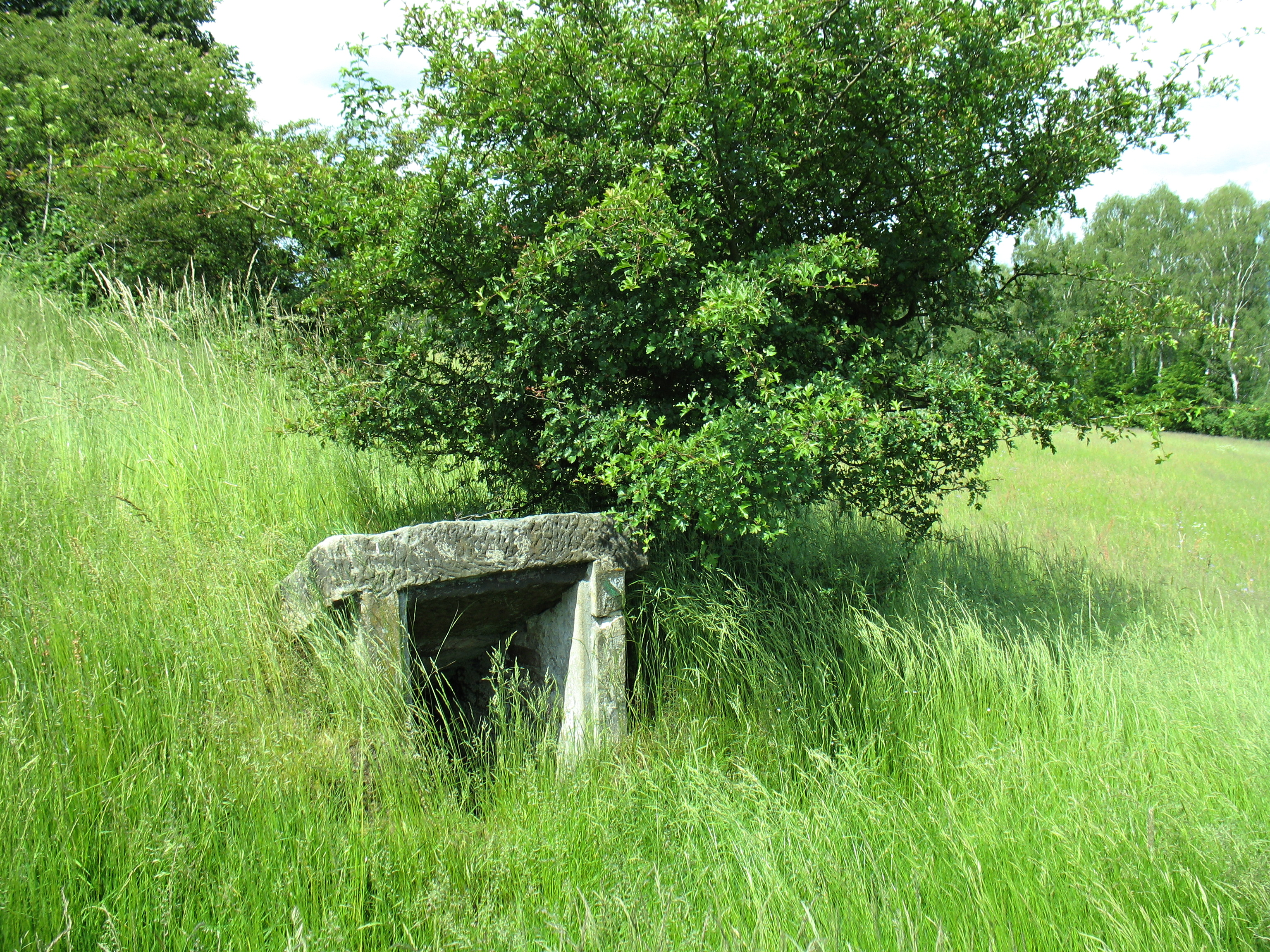 Lokalita na severním svahu Pastevního vrchu u Růžové (okres Děčín), kde stávala vesnice Nová Víska (Neudörfel), která zanikla po roce 1945. Jedna z místních studní